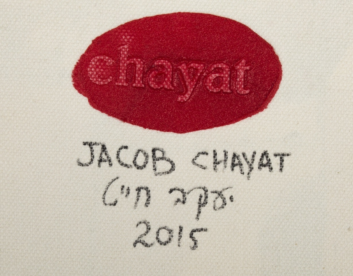 הטבעת גב הציורים, יעקב חייט